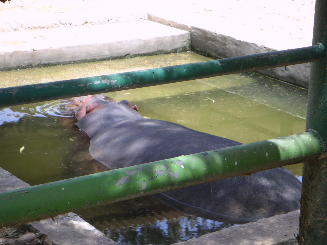 Ein Flusspferd im Zoo der Stadt Kalkilia im Westjordanland.